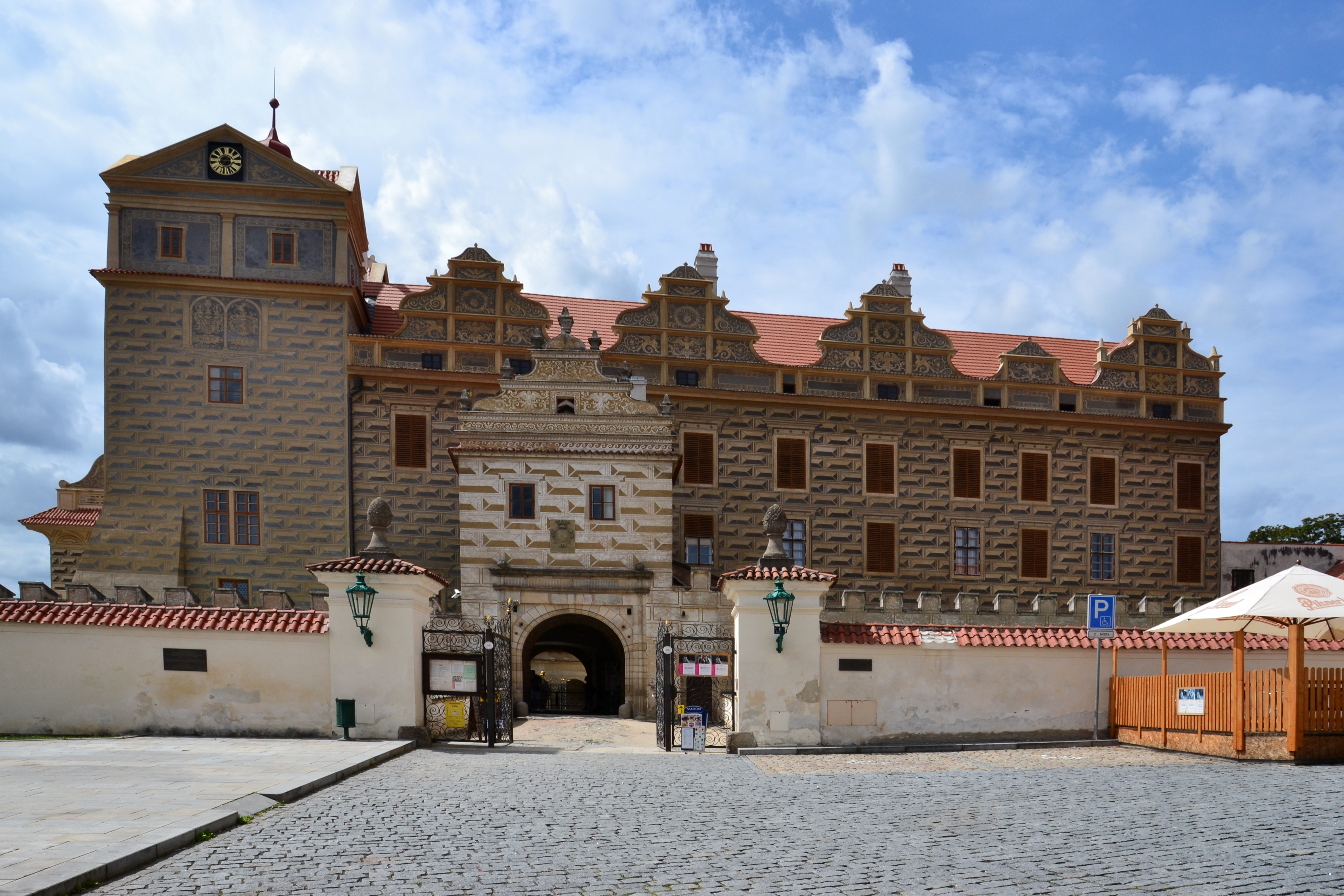 Horšovský Týn – zámecké průčelí